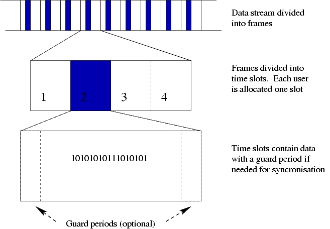 schema van een TDMA systeem